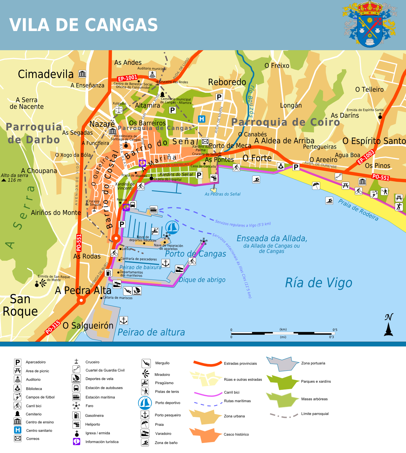 Plano da vila de Cangas